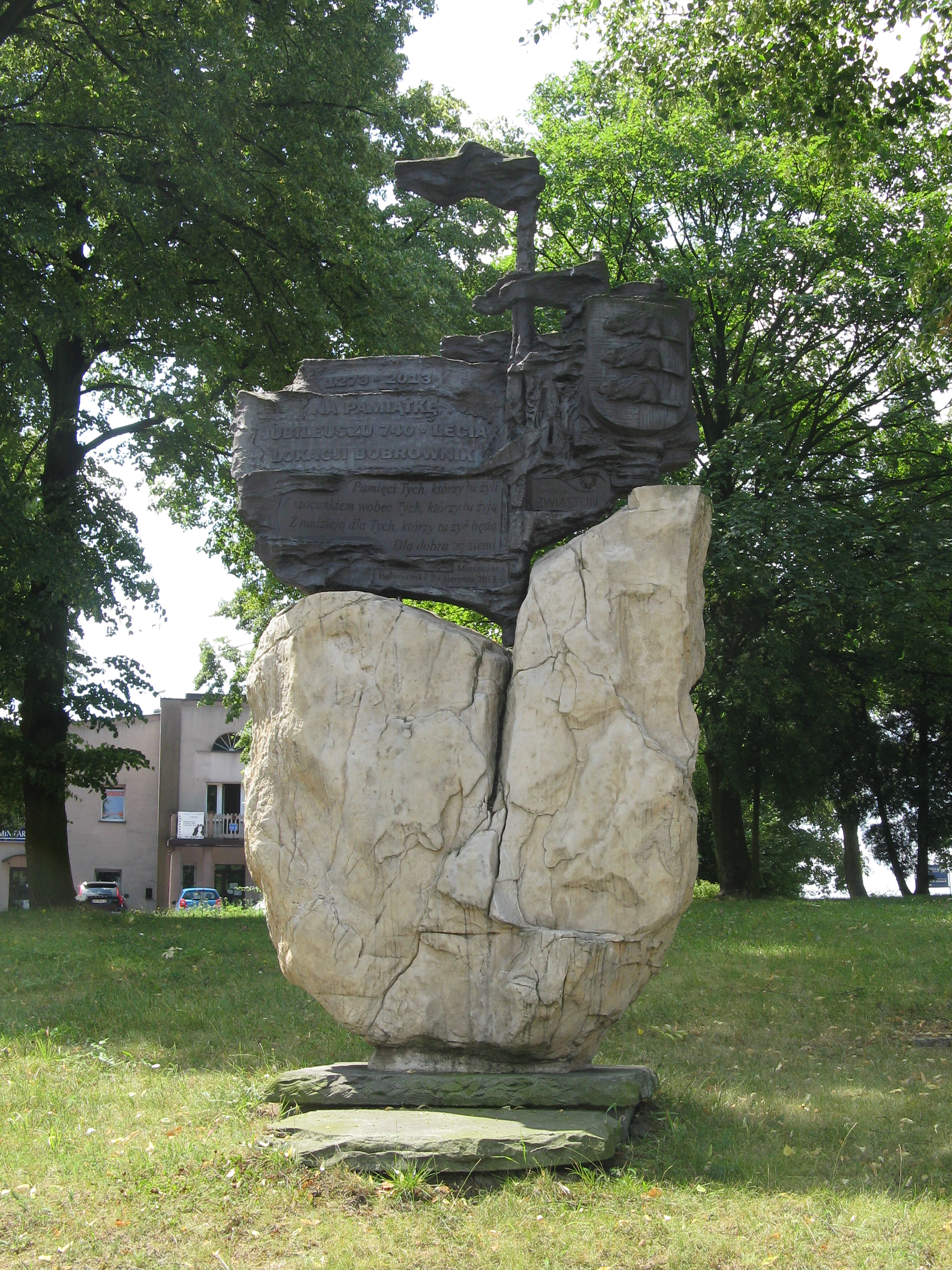 Pomnik-obelisk postawiony z okazji 740. rocznicy lokacji Bobrownik w Bobrownikach.